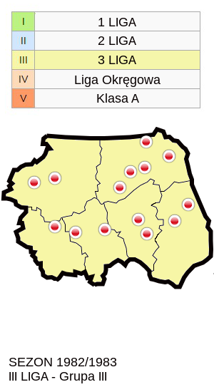 Jagiellonia w sezonie 1982/83 - mapa